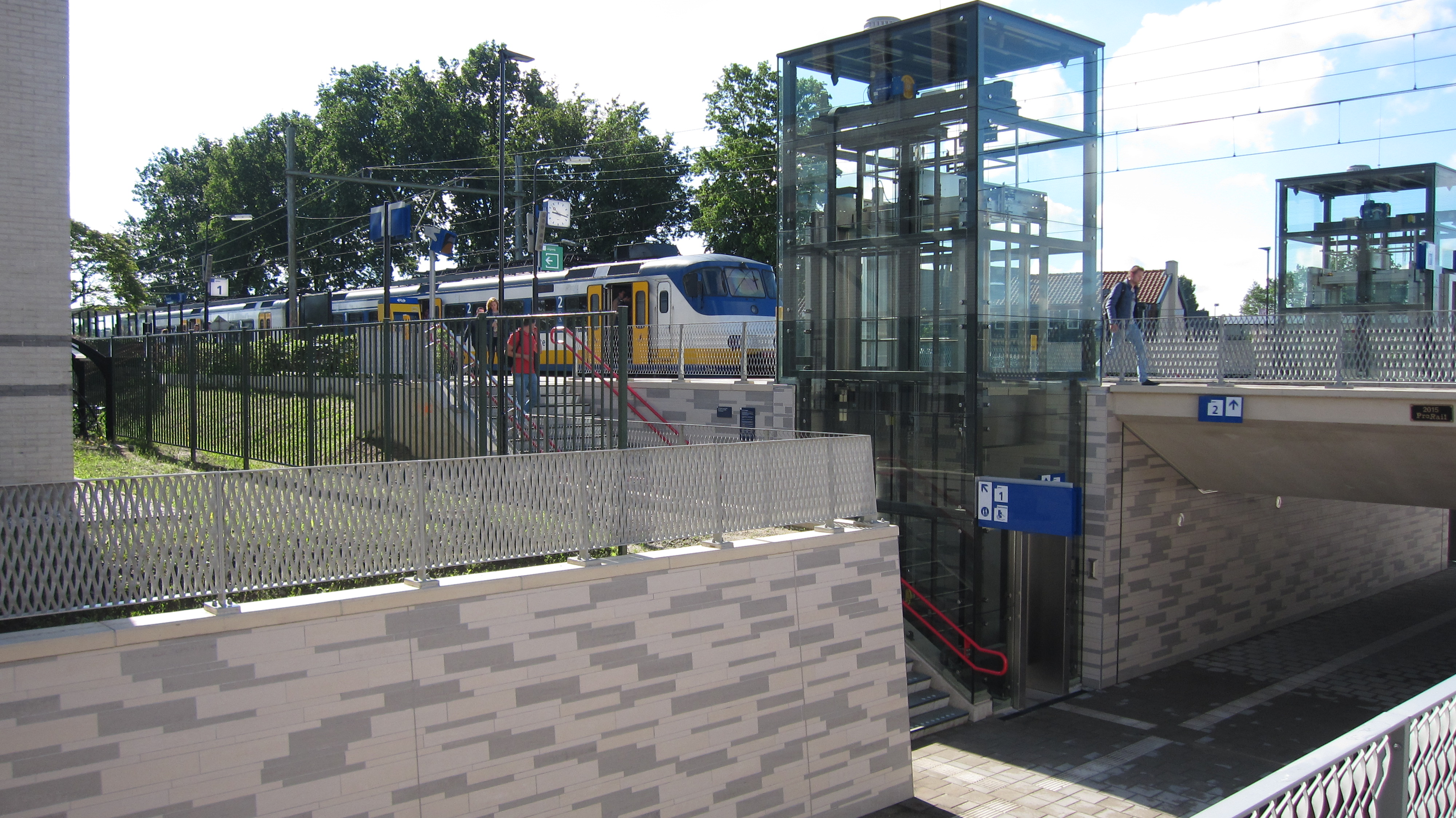 Station Bunnik in mei 2016 na opening van de perrontunnel